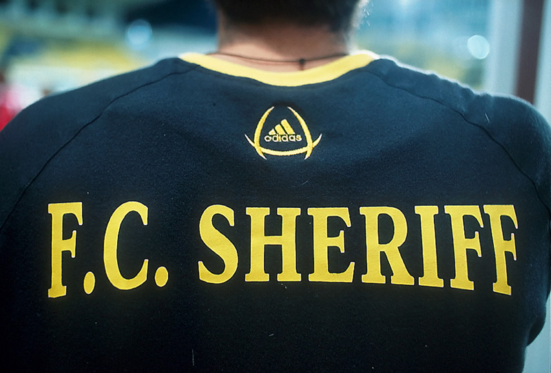 Fussballdress von Șerif Tiraspol